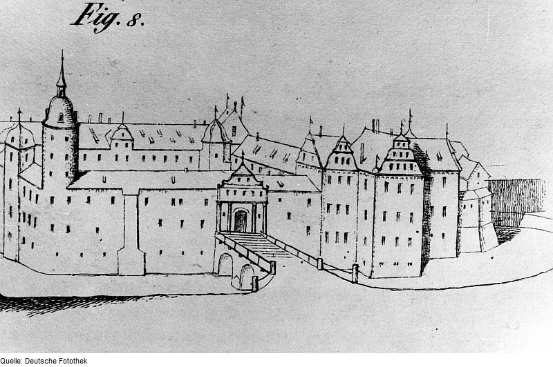 Original image description from the Deutsche Fotothek Freiberg. Schloß Freudenstein, Rekonstruktionszeichnung vom Neubau 1572-75